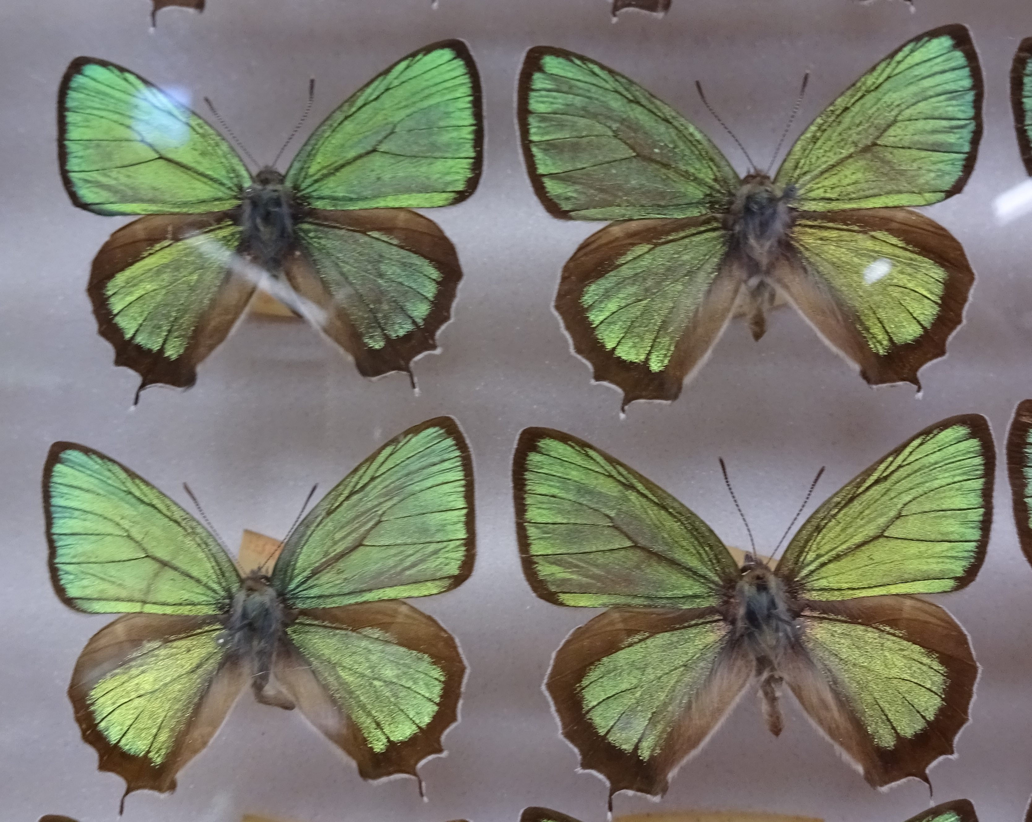 メスアカミドリシジミ